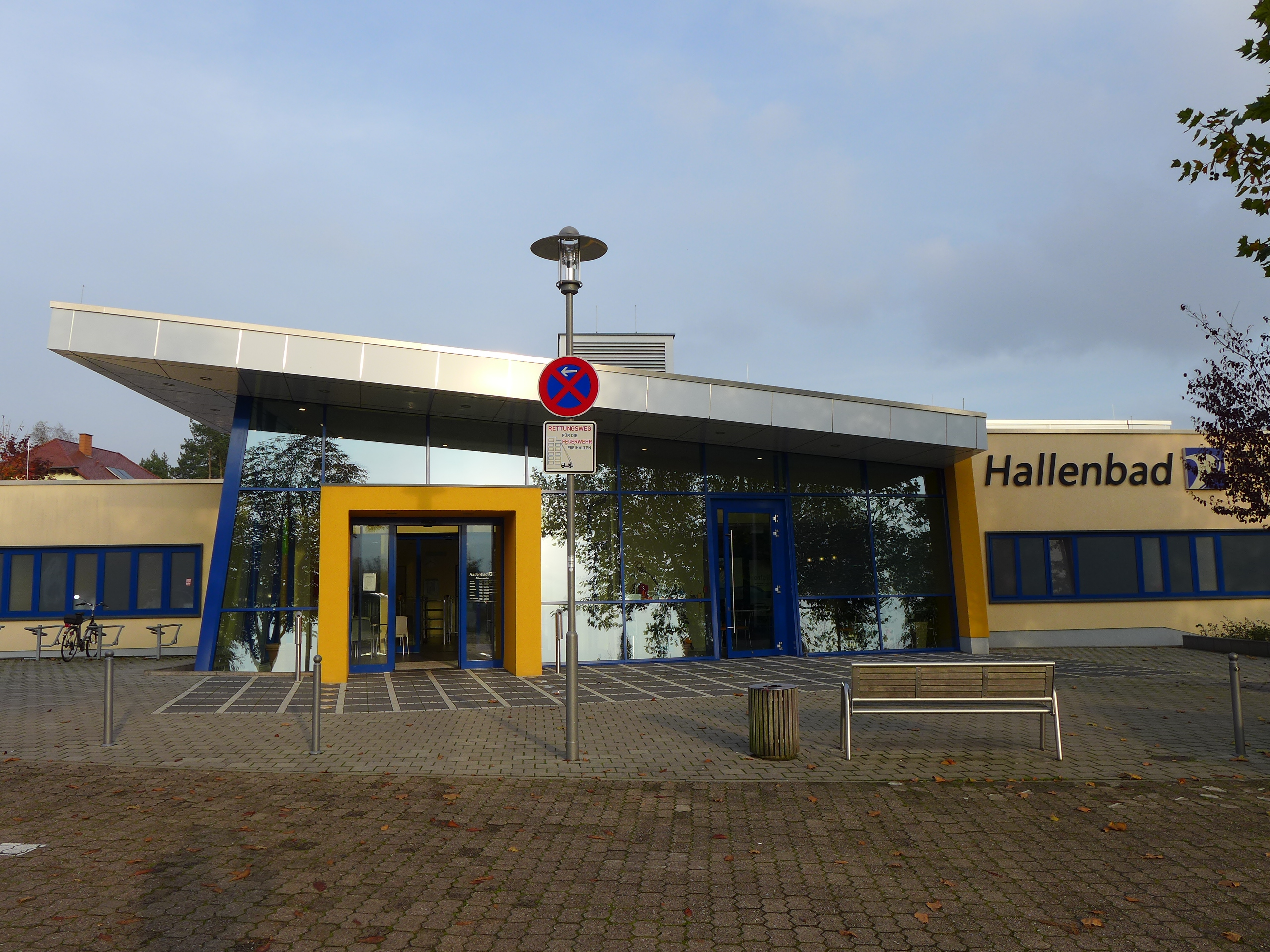 Dillingen/Saar, Hallenbad